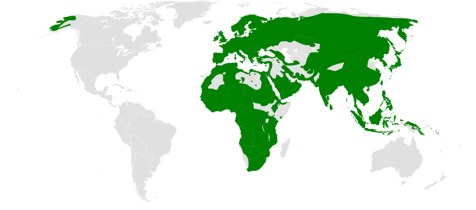 Phylloscopus distribution map